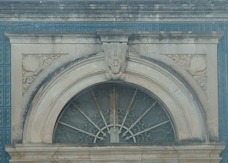 Cornice decorativa in stile Liberty in una casa di Solarino (SR)